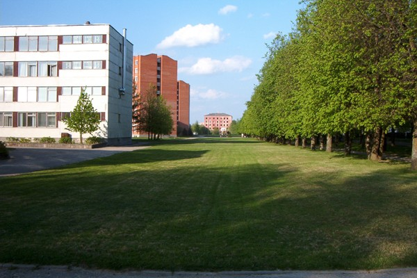 Tartu Tervishoiu Kõrgkooli Nooruse 9 hoone